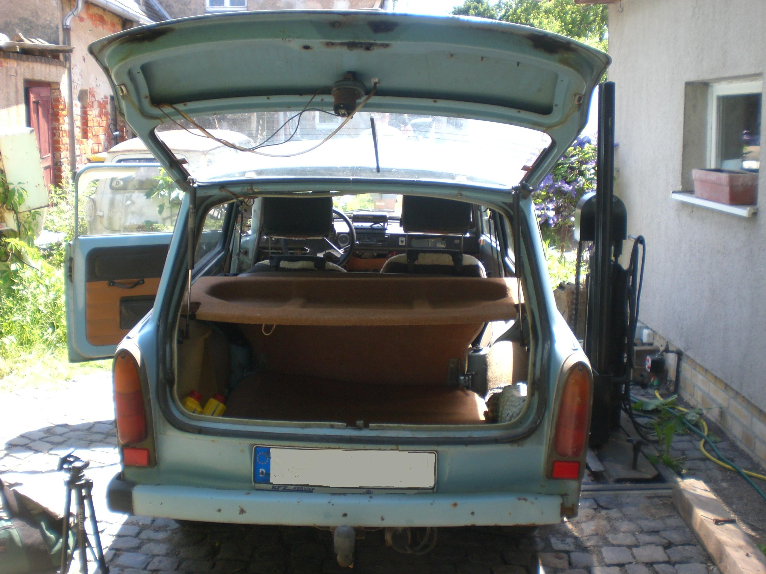 Stauraum eines Trabant 601 "Universal" (Kombi)